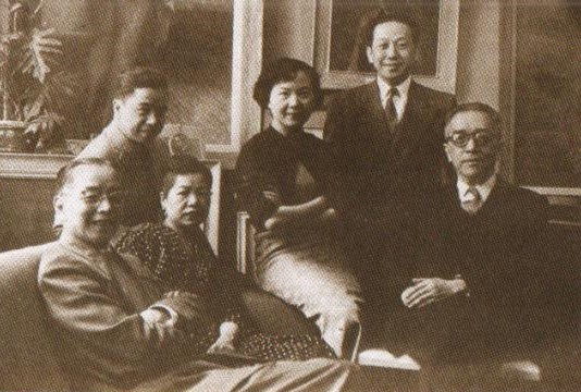 胡適（右一）、孫多慈（右三）、汪亞塵（左一）、王少陵（後排左一）。